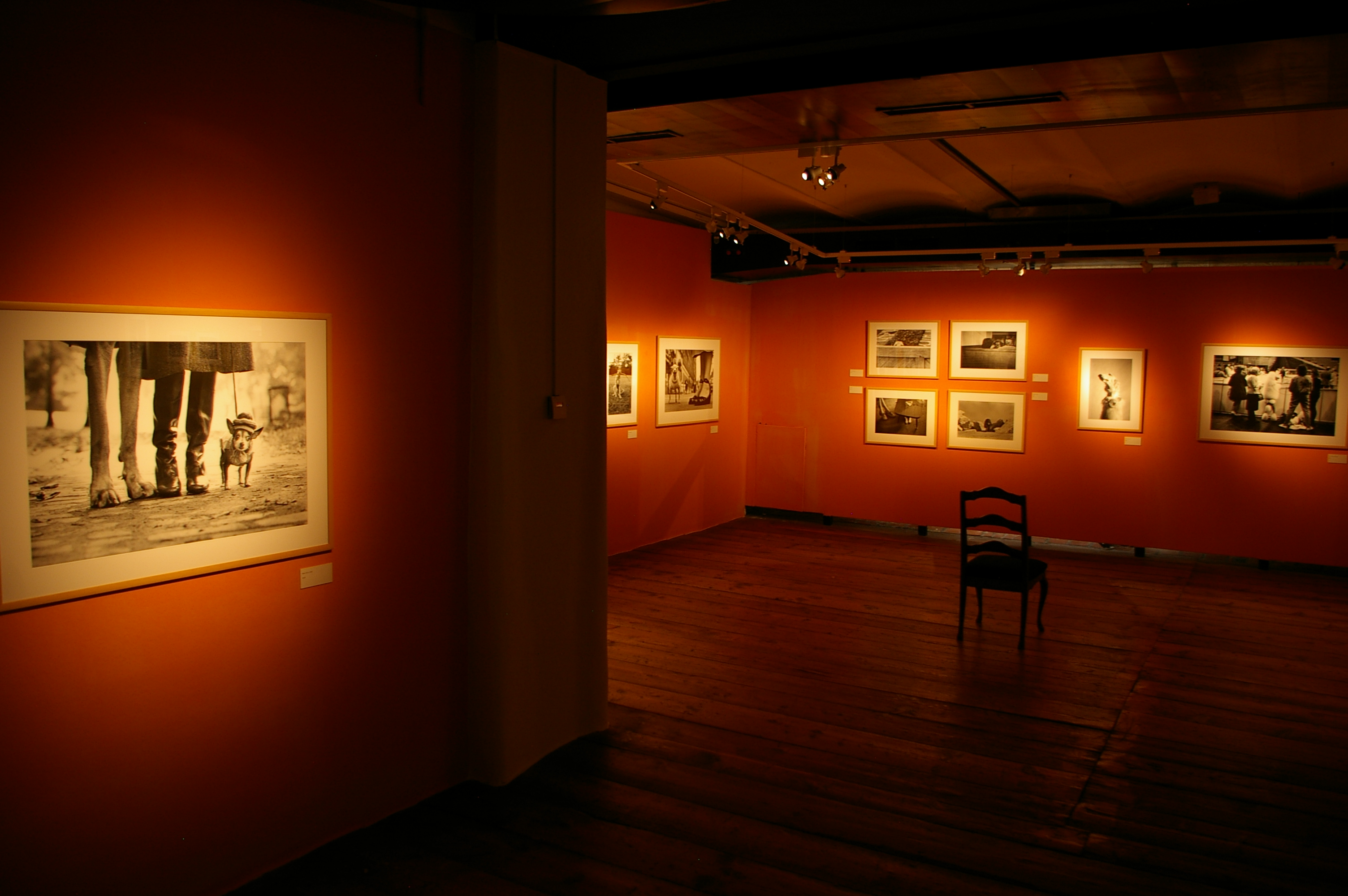 Výstava Elliott Erwitt. Retrospective, KunstHaus, Vídeň, 14. června - 30. září 2012